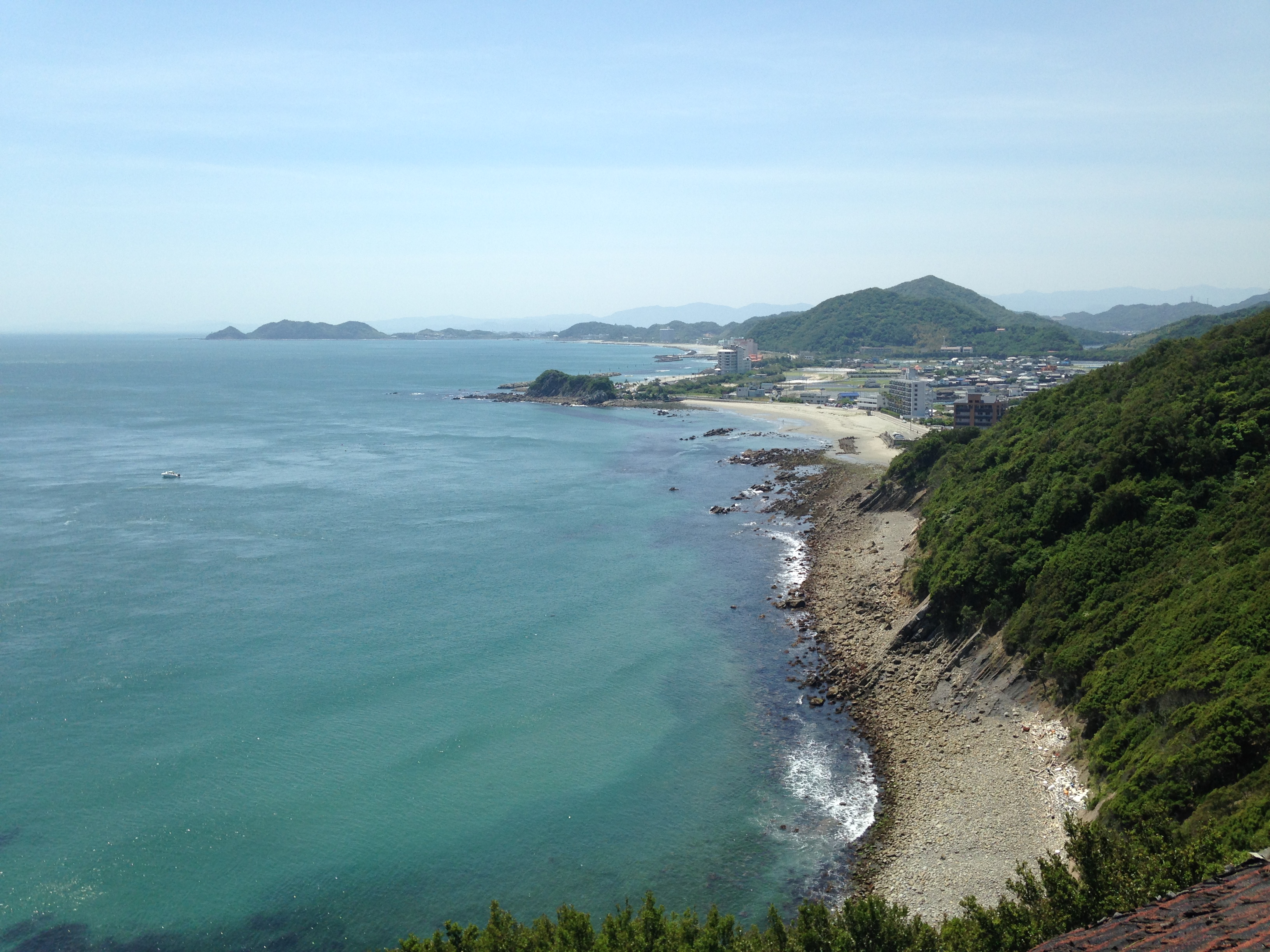 鳴門公園のお茶園展望台より望む大毛海岸